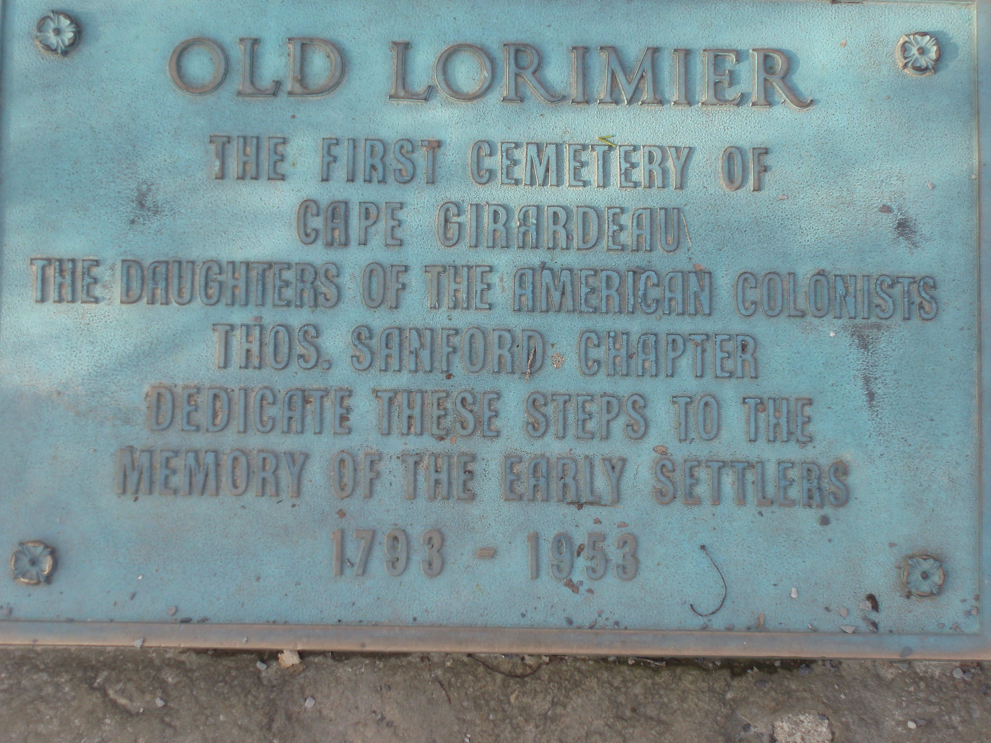 Plaque in front of Old Lorimier Cemetery, Cape Girardeau, Missouri